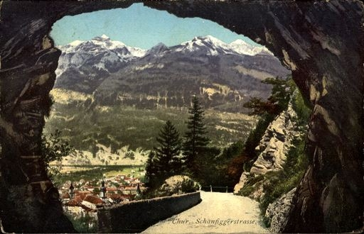 Schanfiggerstrasse